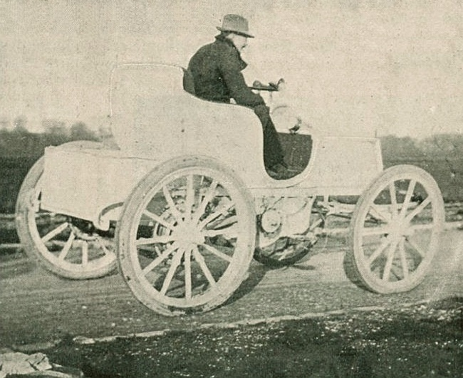 Le comte Gaston de Chasseloup-Laubat le 17 janvier 1899 à Achères sur sa première Jeantaud Duc électrique (RM, La Vie au Grand Air, 18 mars 1899) - La Vie au Grand Air, 18 mars 1899.